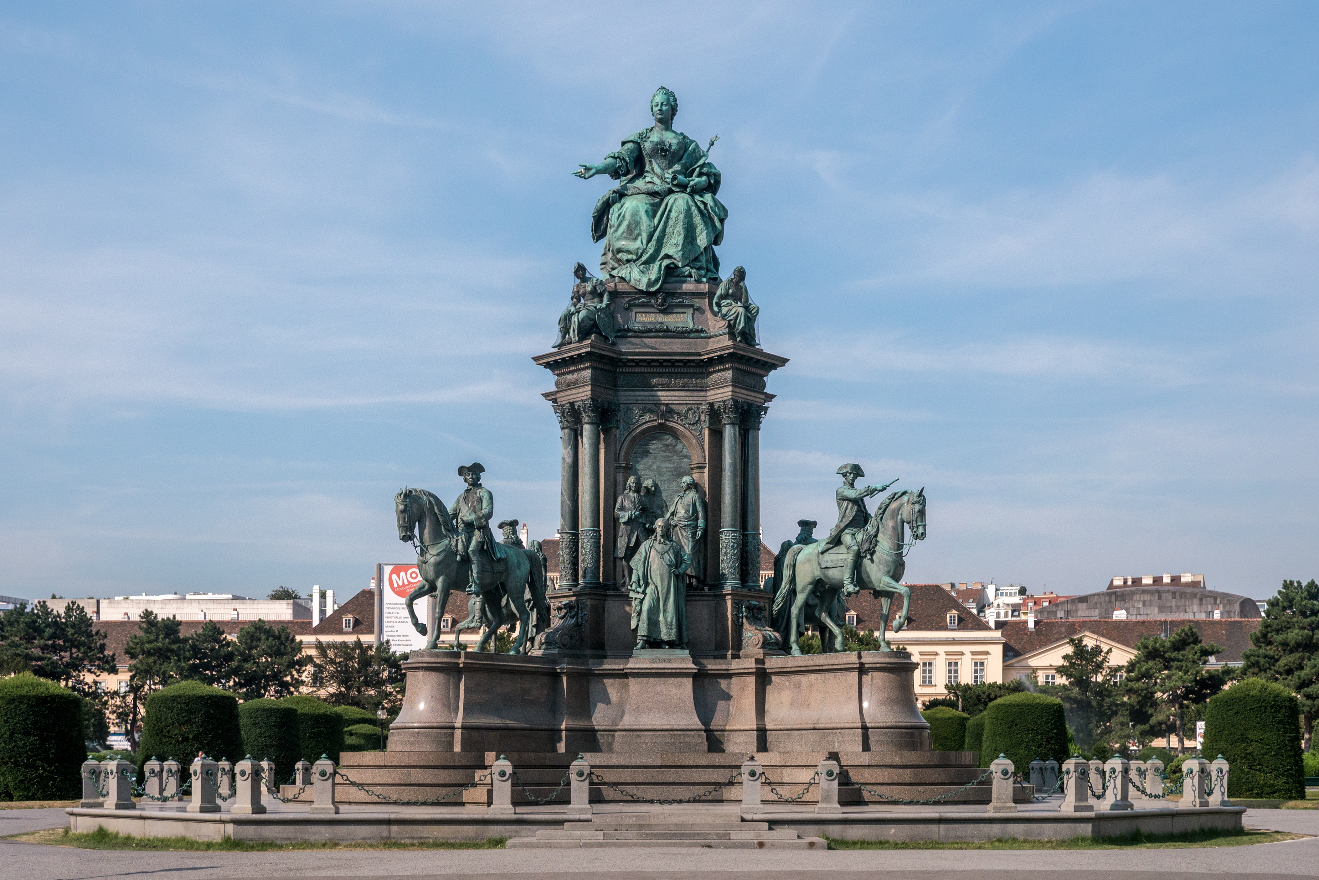 Maria-Theresien-Denkmal